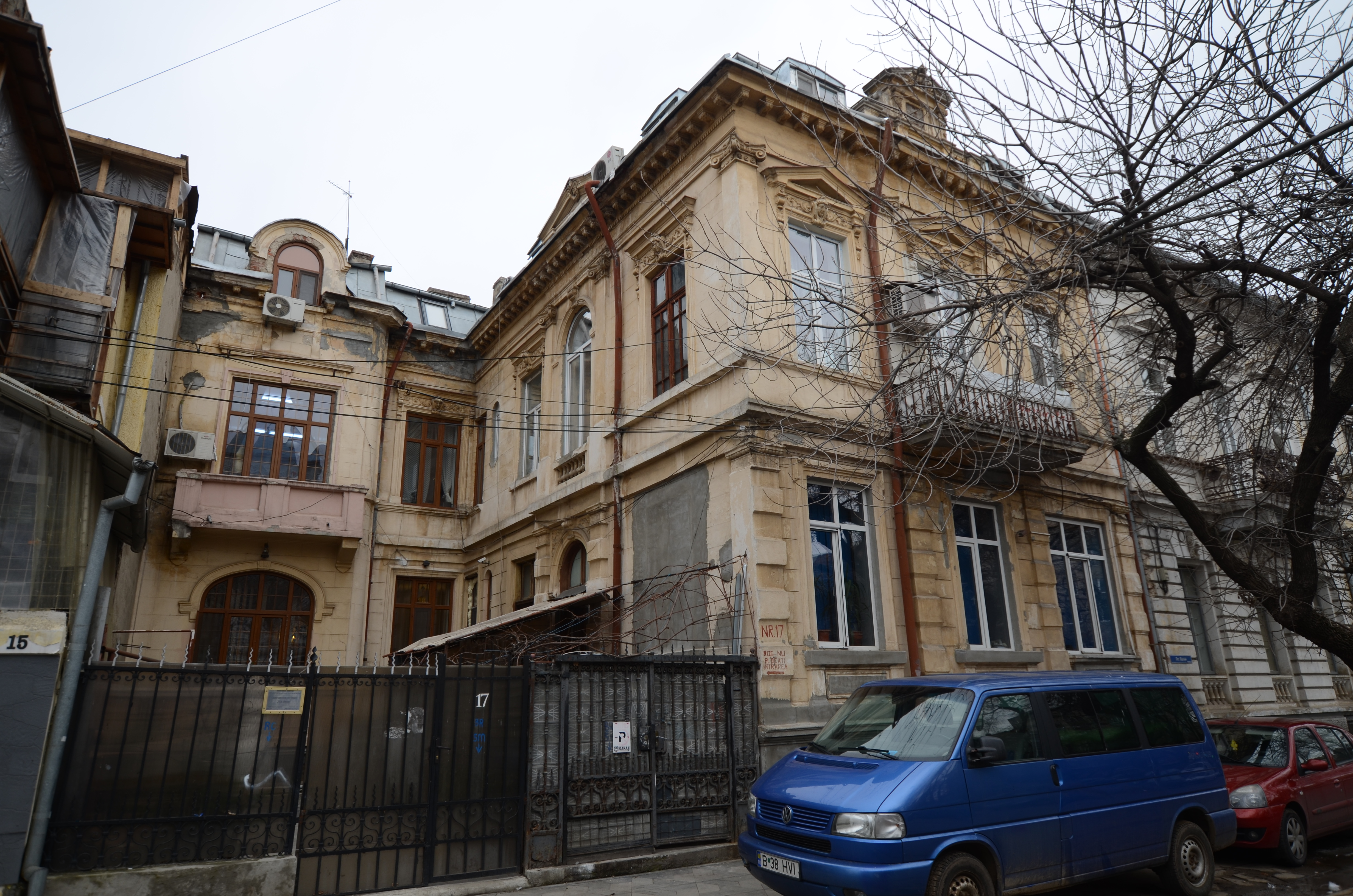 Casă, Str. Băniei nr. 17, București